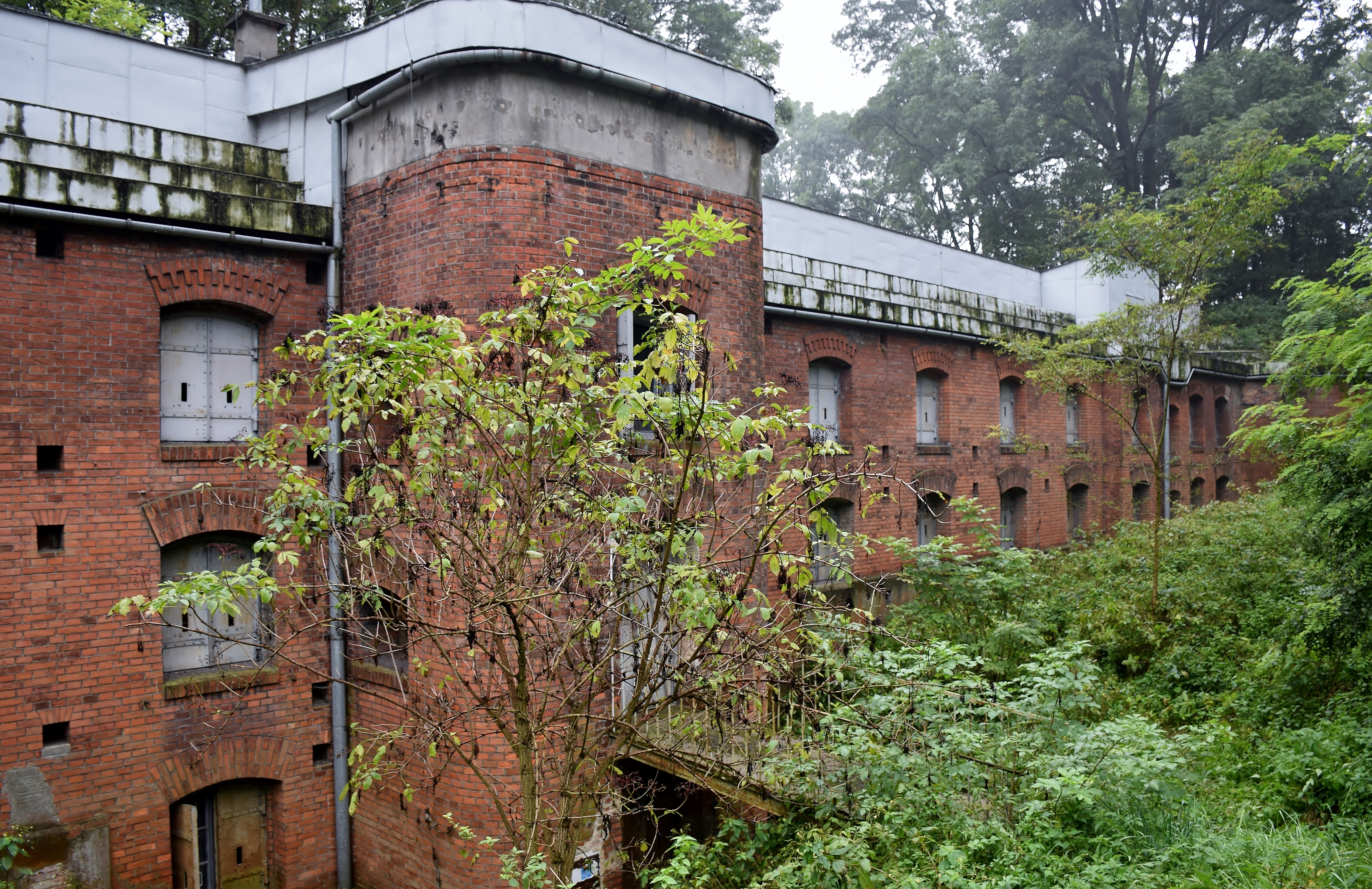 Kraków, fort nr 50 1/2 BARYCZ, 1897-1899